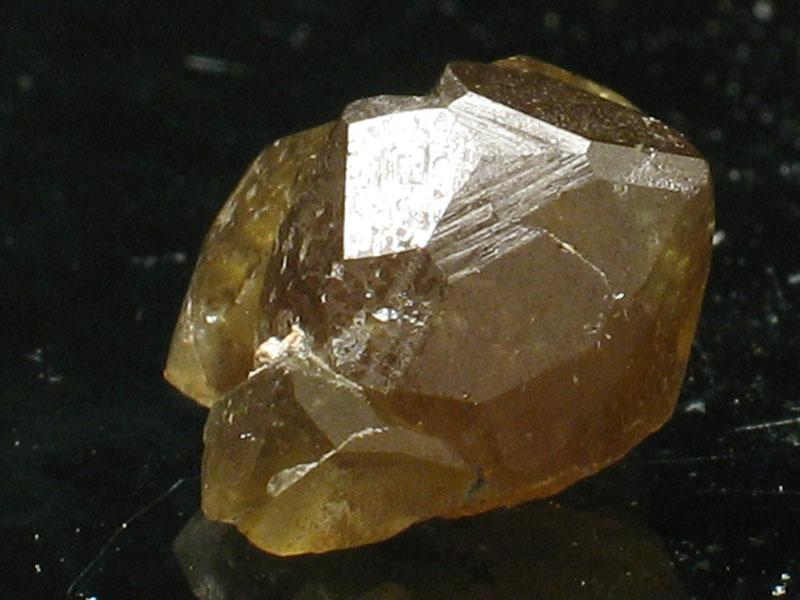 zielony granat, pochodzenie Madagaskar, autor zdjęcia Stowarzyszenie Spirifer